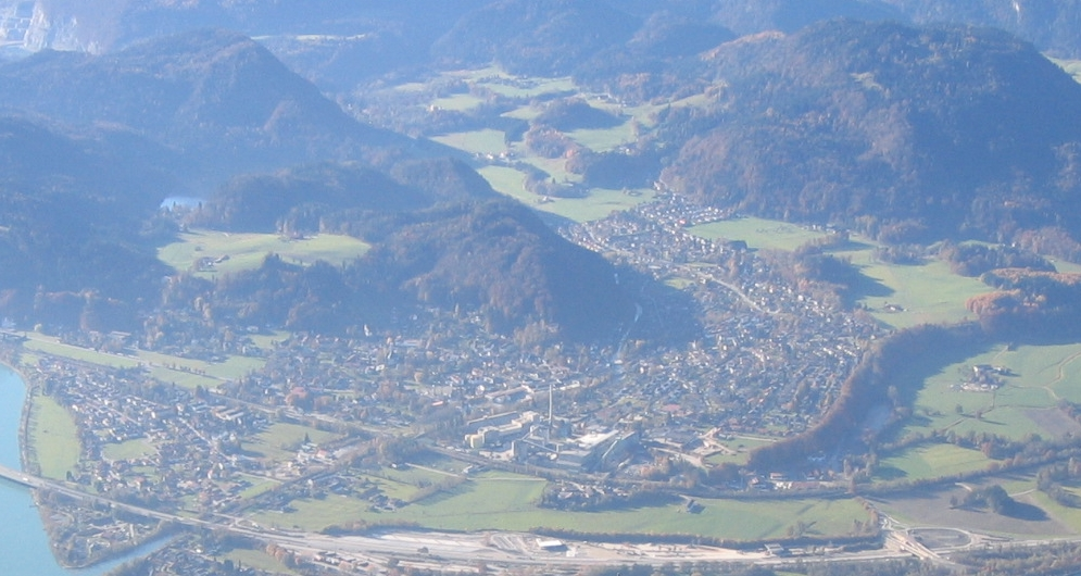 Kiefersfelden